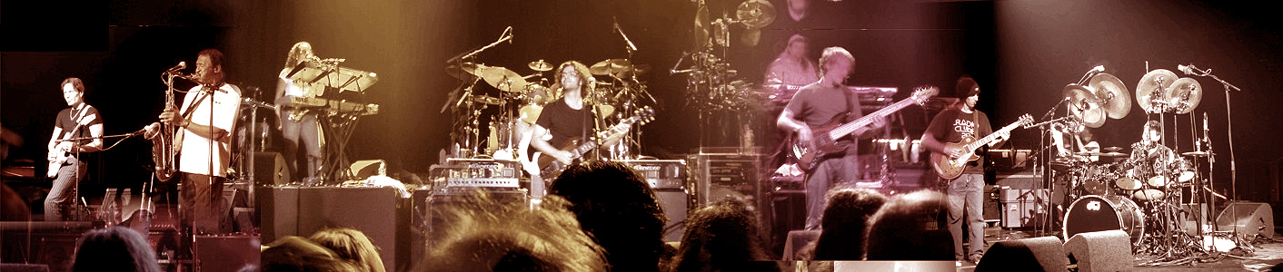 Dweezil Zappa a ZPZ csapattal (Budapest, Petőfi Csarnok)